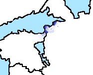 Izhorian language